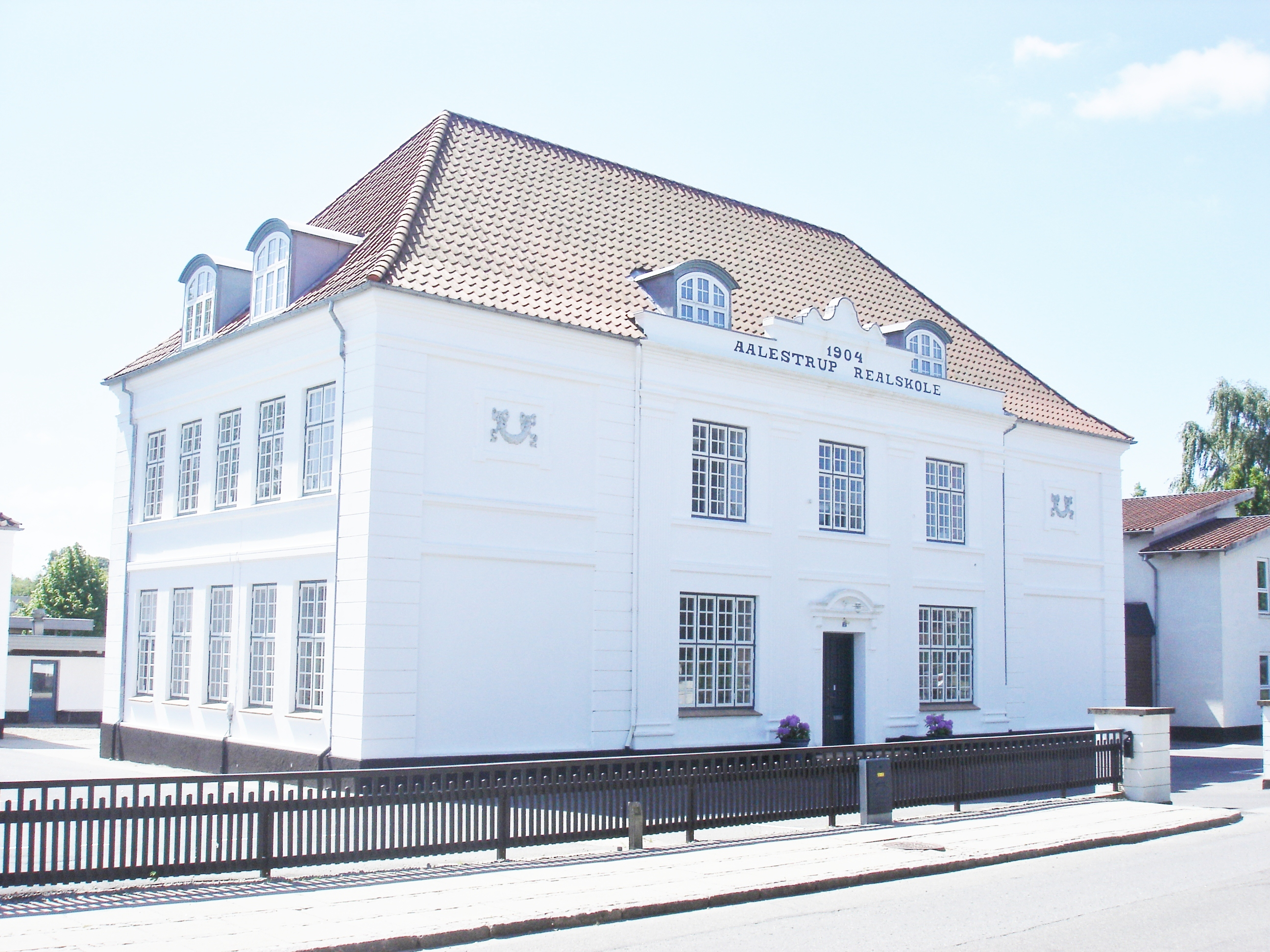 Aalestrup Realskole, opført 1904